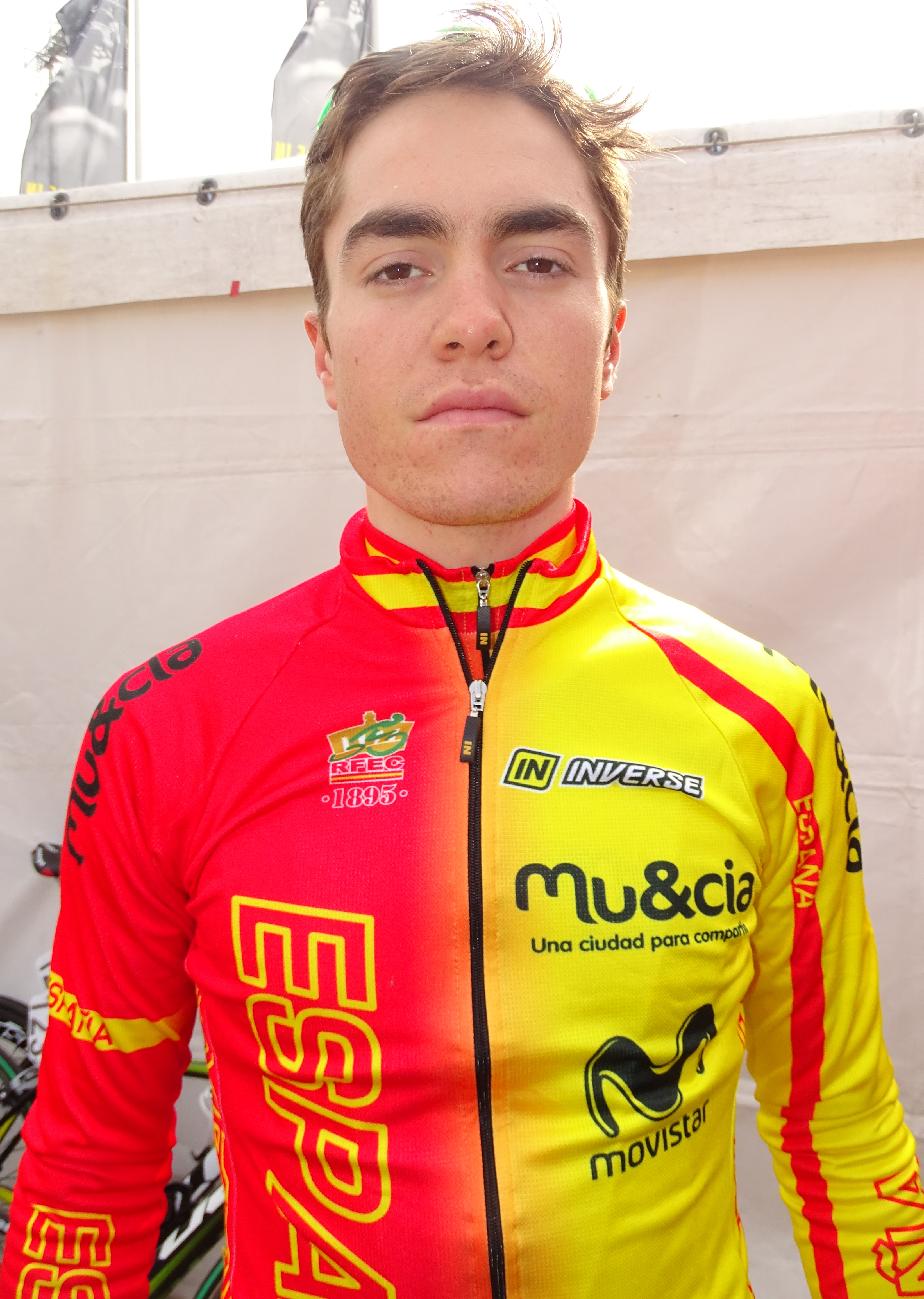 Reportage réalisé le samedi 9 avril à l'occasion du départ et de l'arrivée du Tour des Flandres espoirs 2016 à Audenarde, Belgique.